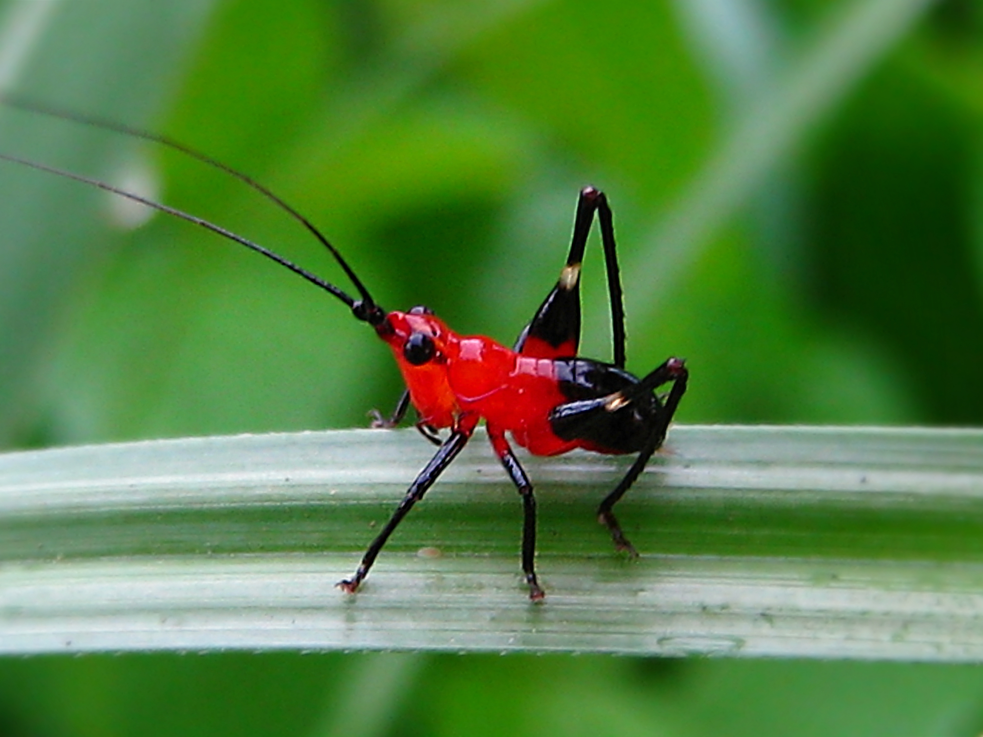 Conocephalus melas = Conocephalus melaenus